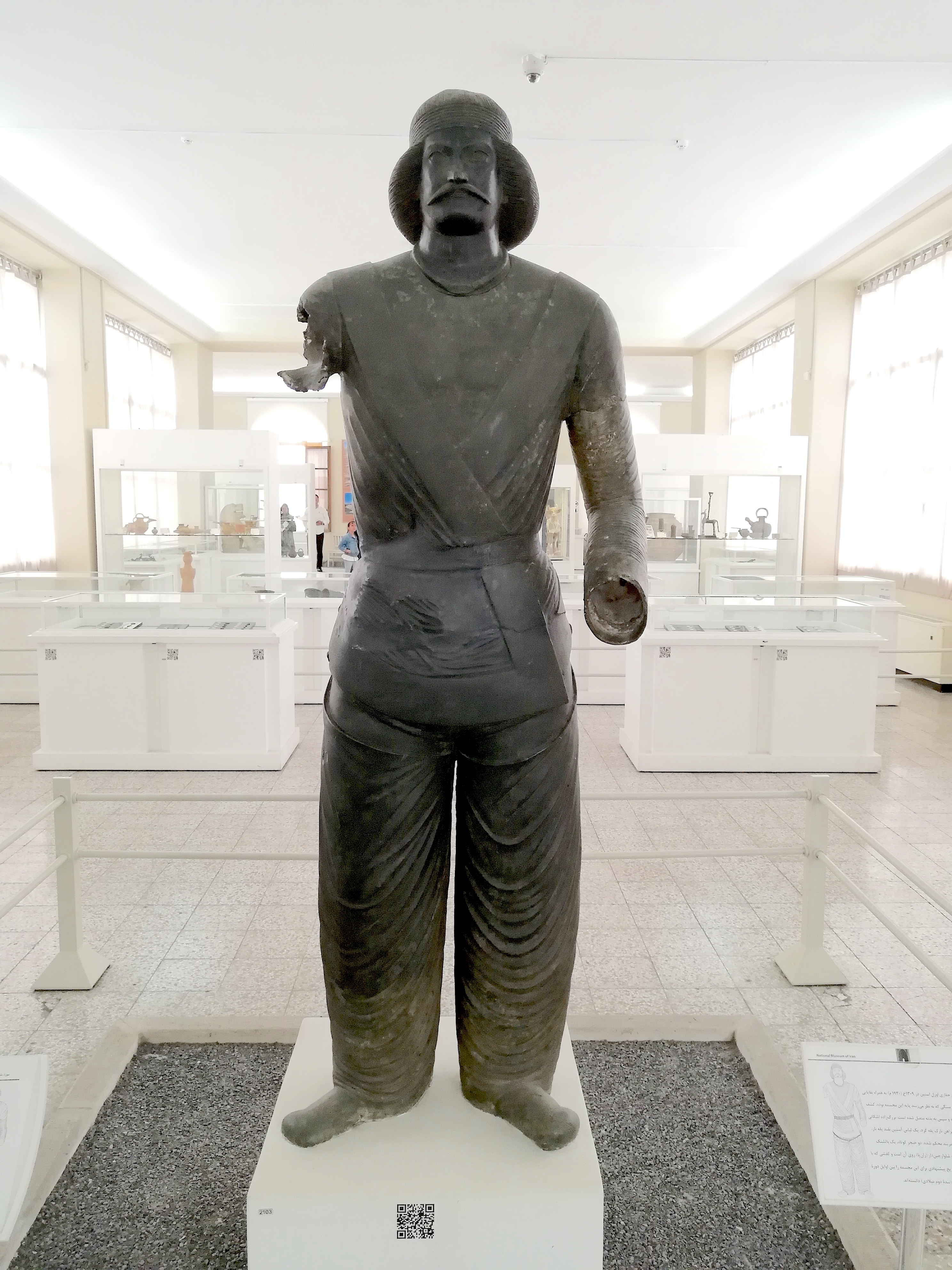 مجسمه مرد پارتی